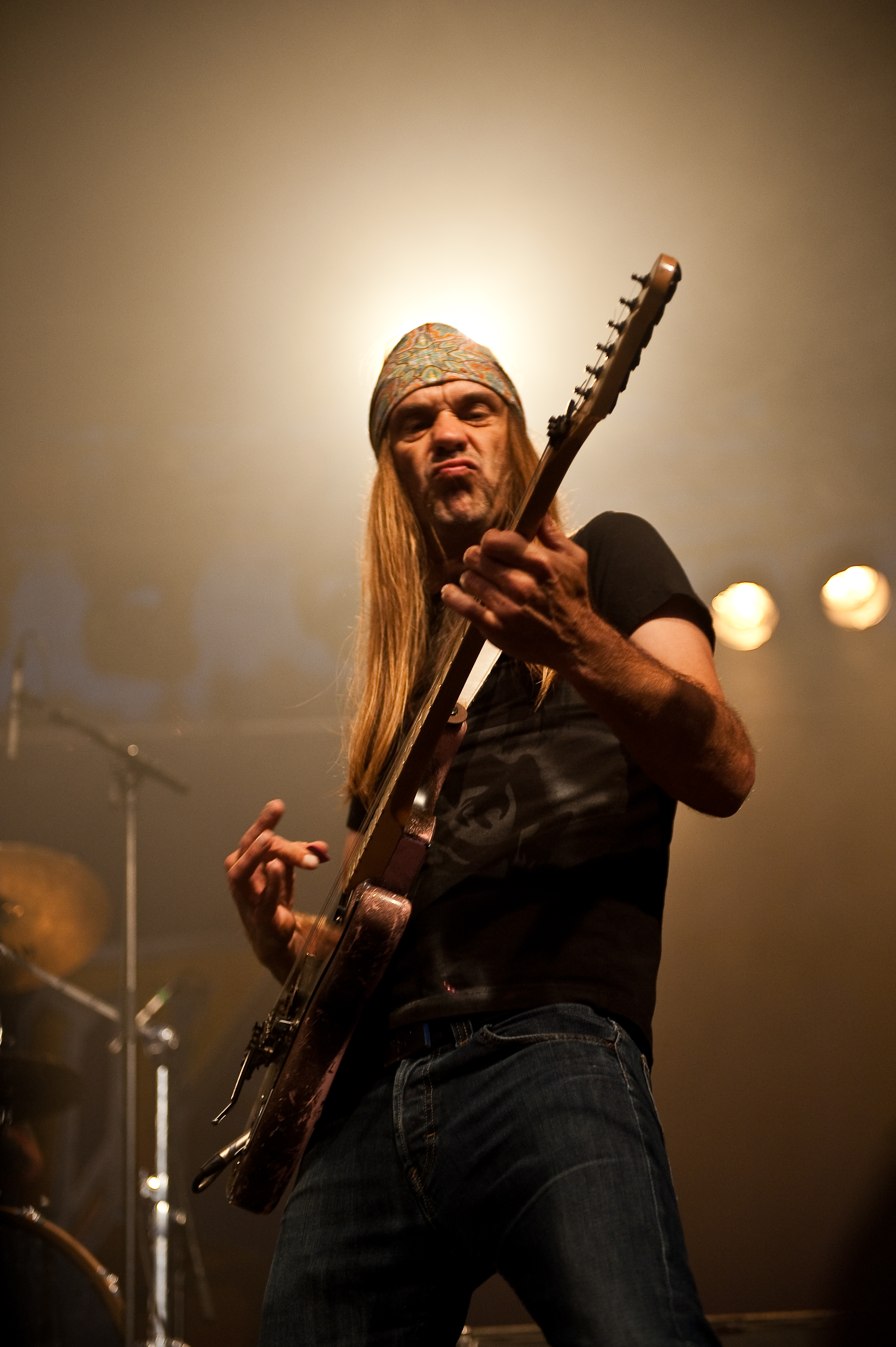 Ronni Le Tekrø, norsk gitarist